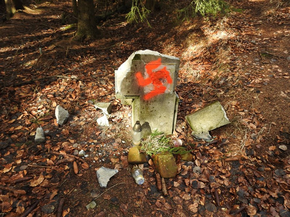 Zničení pomníku zbytečným obětem 20.2.2020